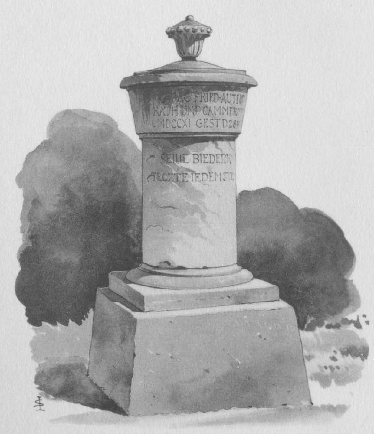 Stuttgart. Hoppenlaufriedhof, Grab von Jacob Friedrich Autenrieth (1740-1800).